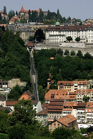 Fribourg / Freiburg: Funiculaire